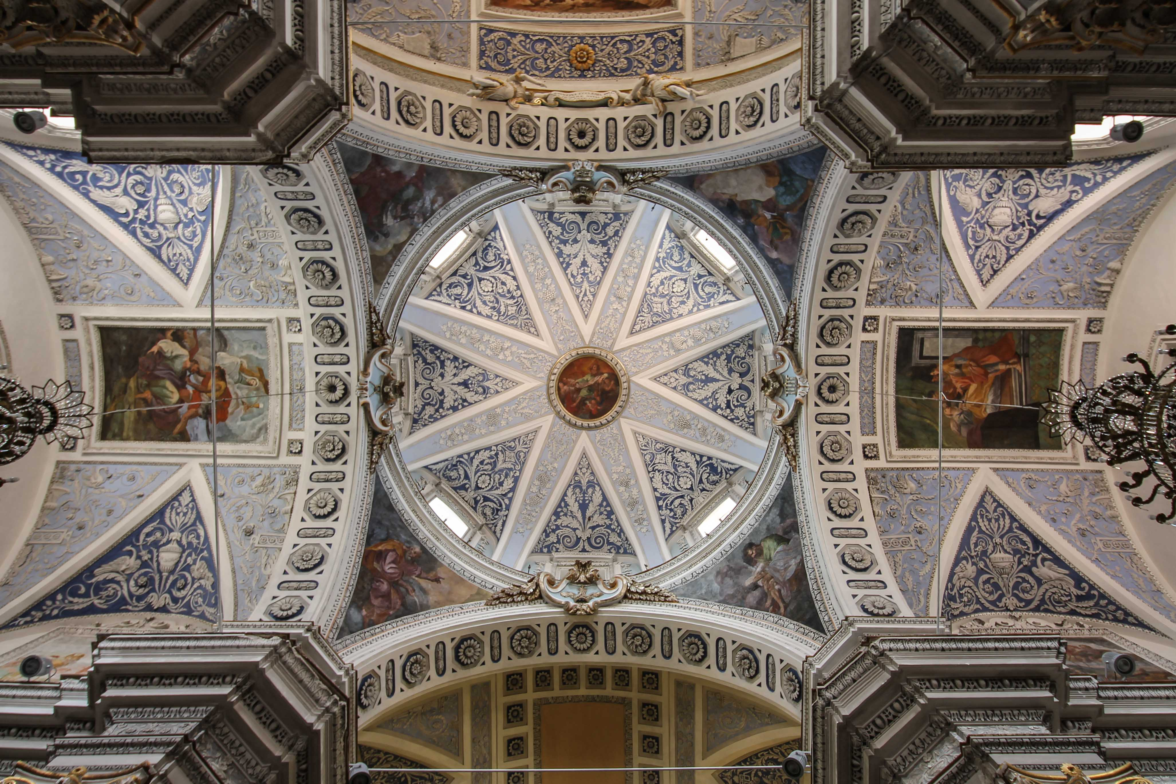 Ex cattedrale dedicata a Santa maria La Cava e i fratelli Alfio, Filadelfo e Cirino, patroni e protettori della città di Lentini. La chiesa ha origine nel periodo paleocristiano, come testimonia la presenza al suo interno, nella navata destra, un complesso di tre arcosoli, scavati nella roccia, luogo di sepoltura dei 3 fratelli. L'attuale chiesa venne costruita dopo il terremoto del 1693 ed ultimata nel 1750. La facciata è di stile tardo barocco, finemente decorata, mentre al suo interno e ricca di decorazioni in stucco, affreschi, tele del XVII-XVIII secolo e molti altri reperti ed opere.